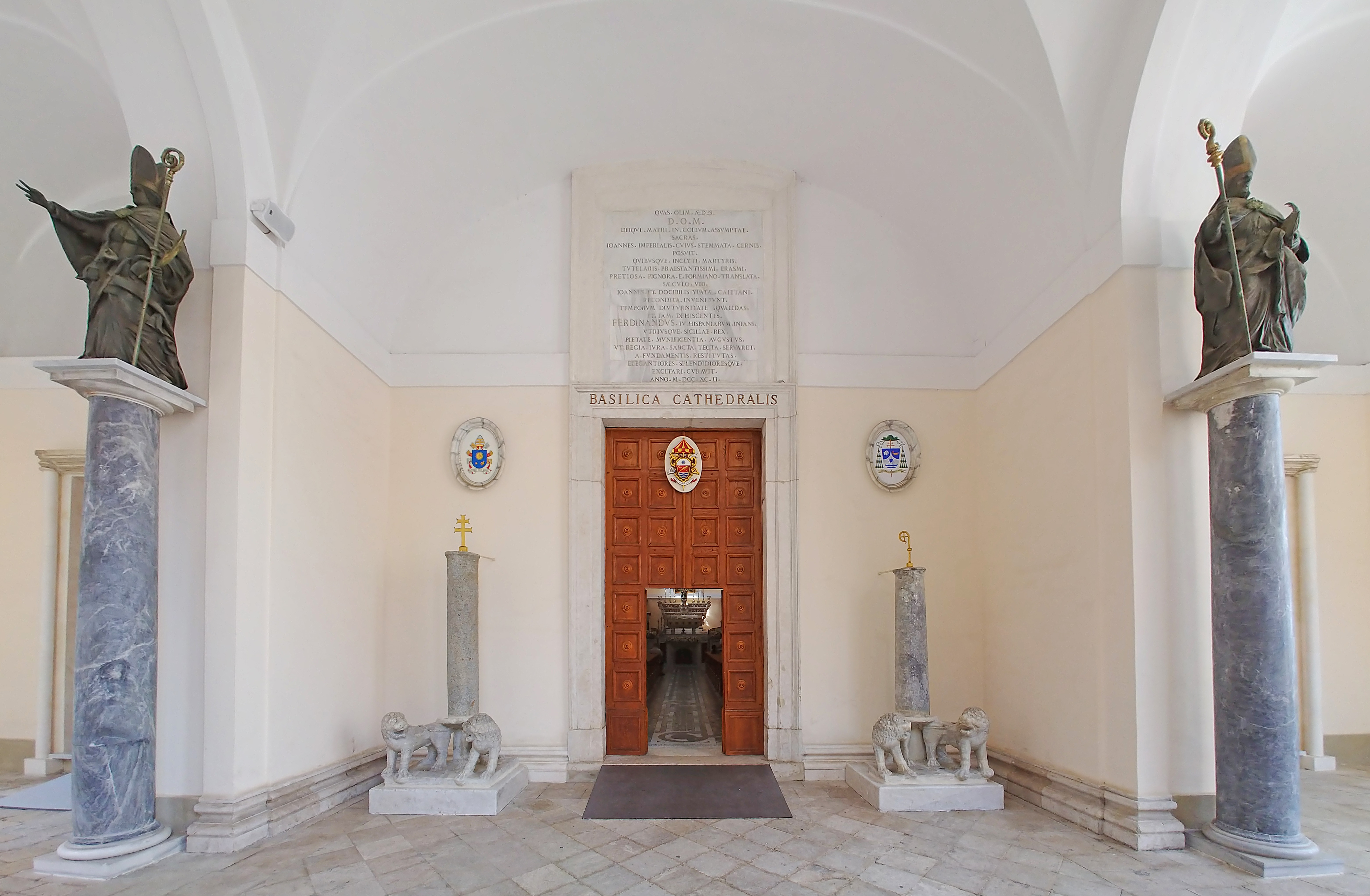 Atrio.